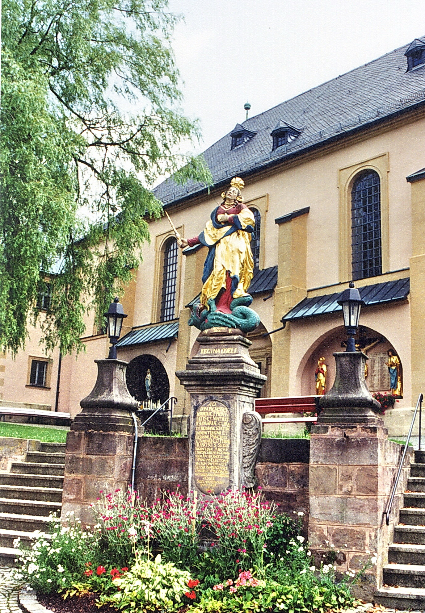 Kloster Marienweiher, Klosterkirche Mariä Heimsuchung und Figurengruppe "Regina coeli" ("Königin des Himmels") auf besiegtem Teufelsdrachen von Johann Kaspar Metzner 1695